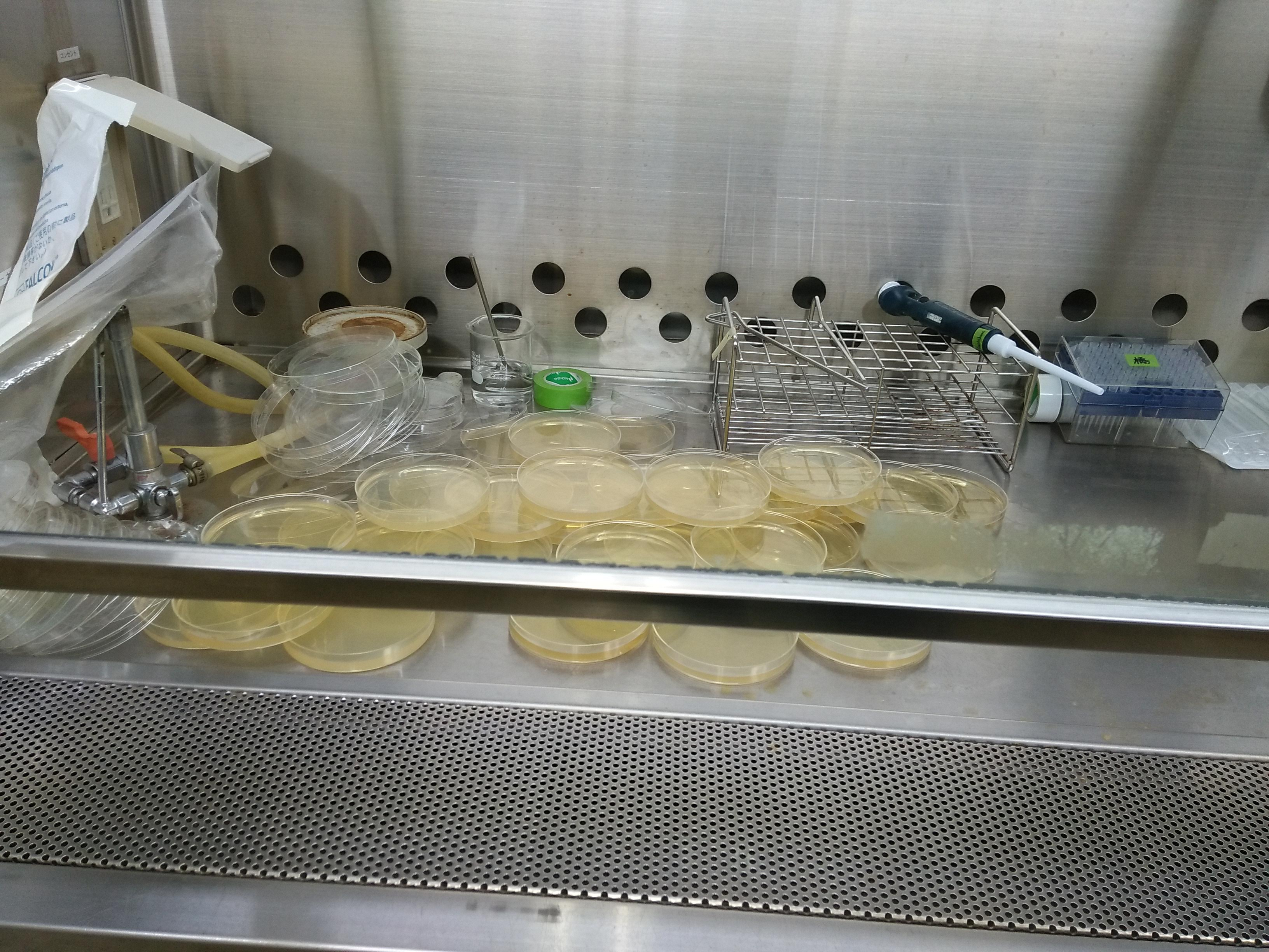 Plate agar LB